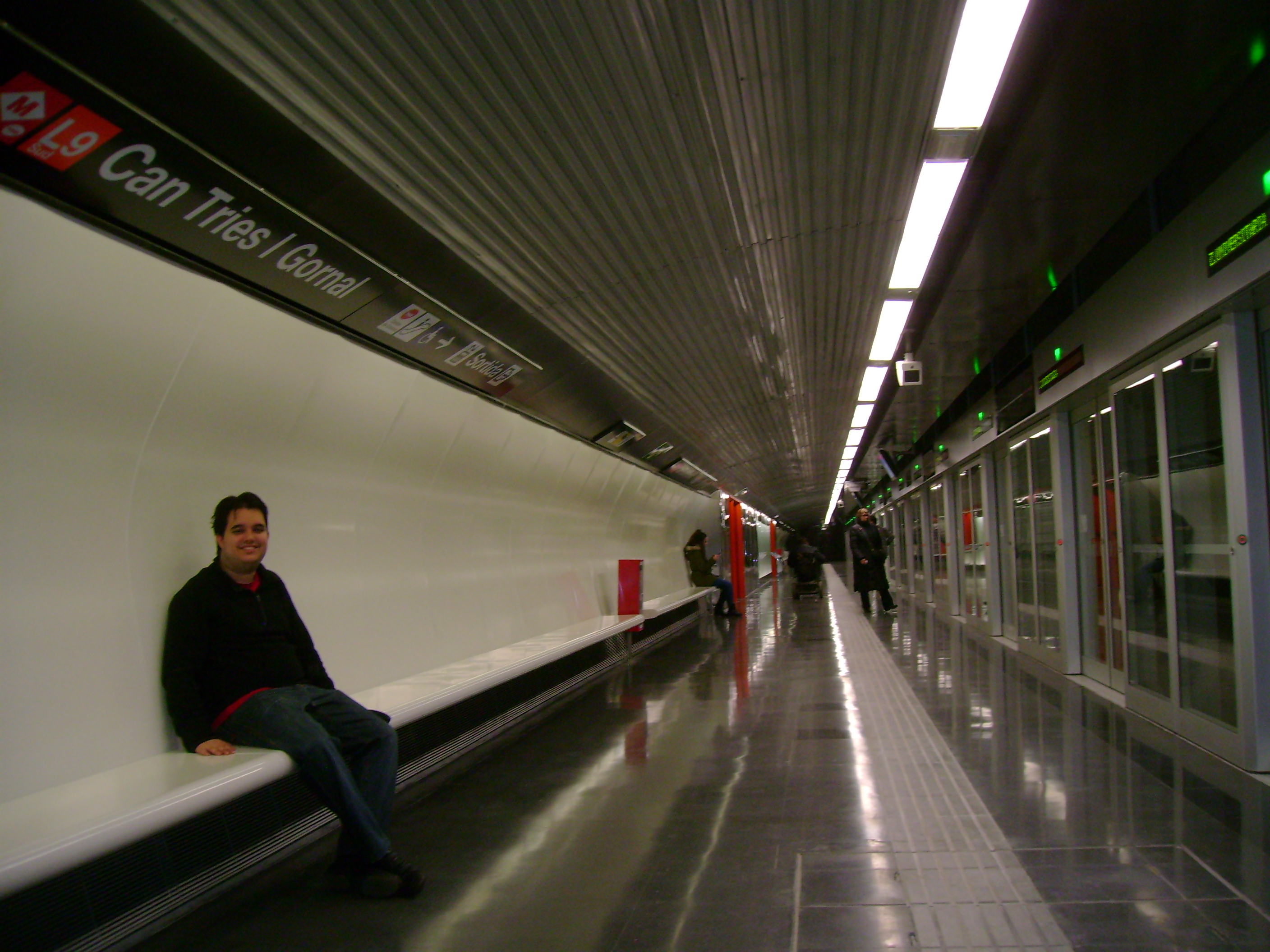 Gornal.